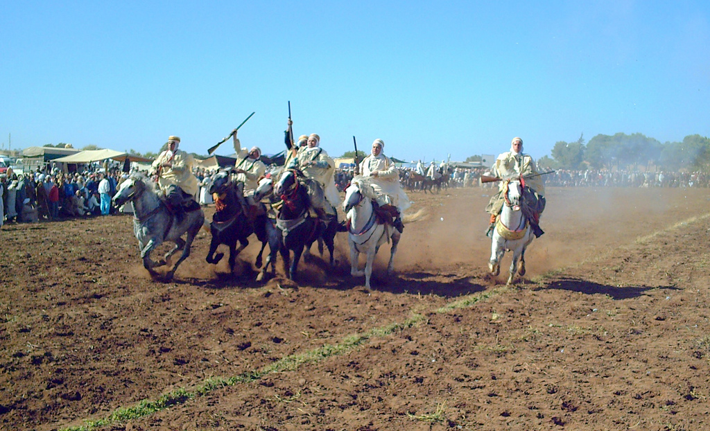 Fantasia Mostaganem 28-05-2008